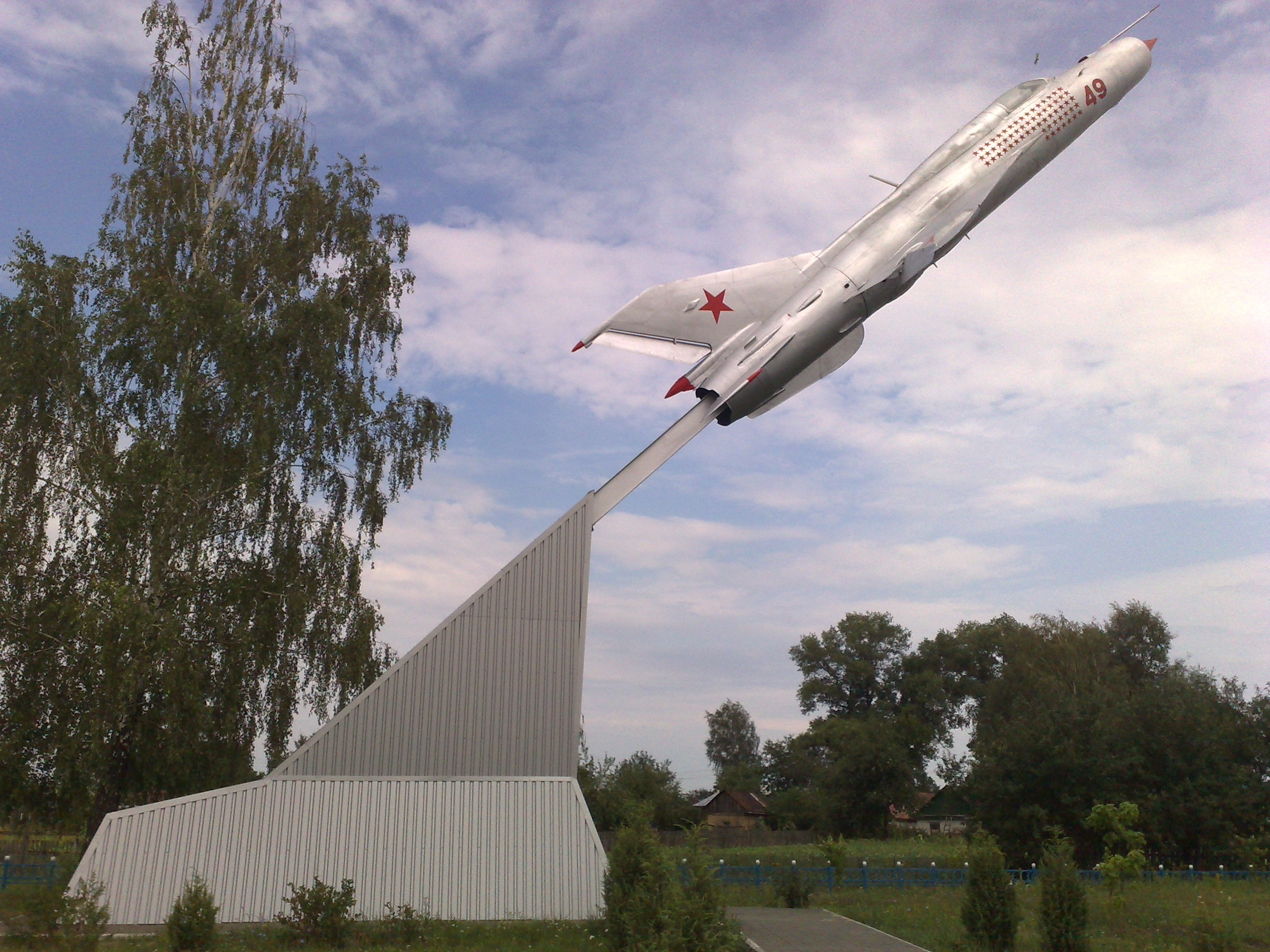 Літак МІГ-21, встановлений на честь Кожедуба І.М., уродженця села тричі Героя Радянського Союзу, Шосткинський район, с. Ображіївка, центр сільради, центр села